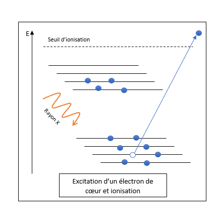 Exemple de rayon X